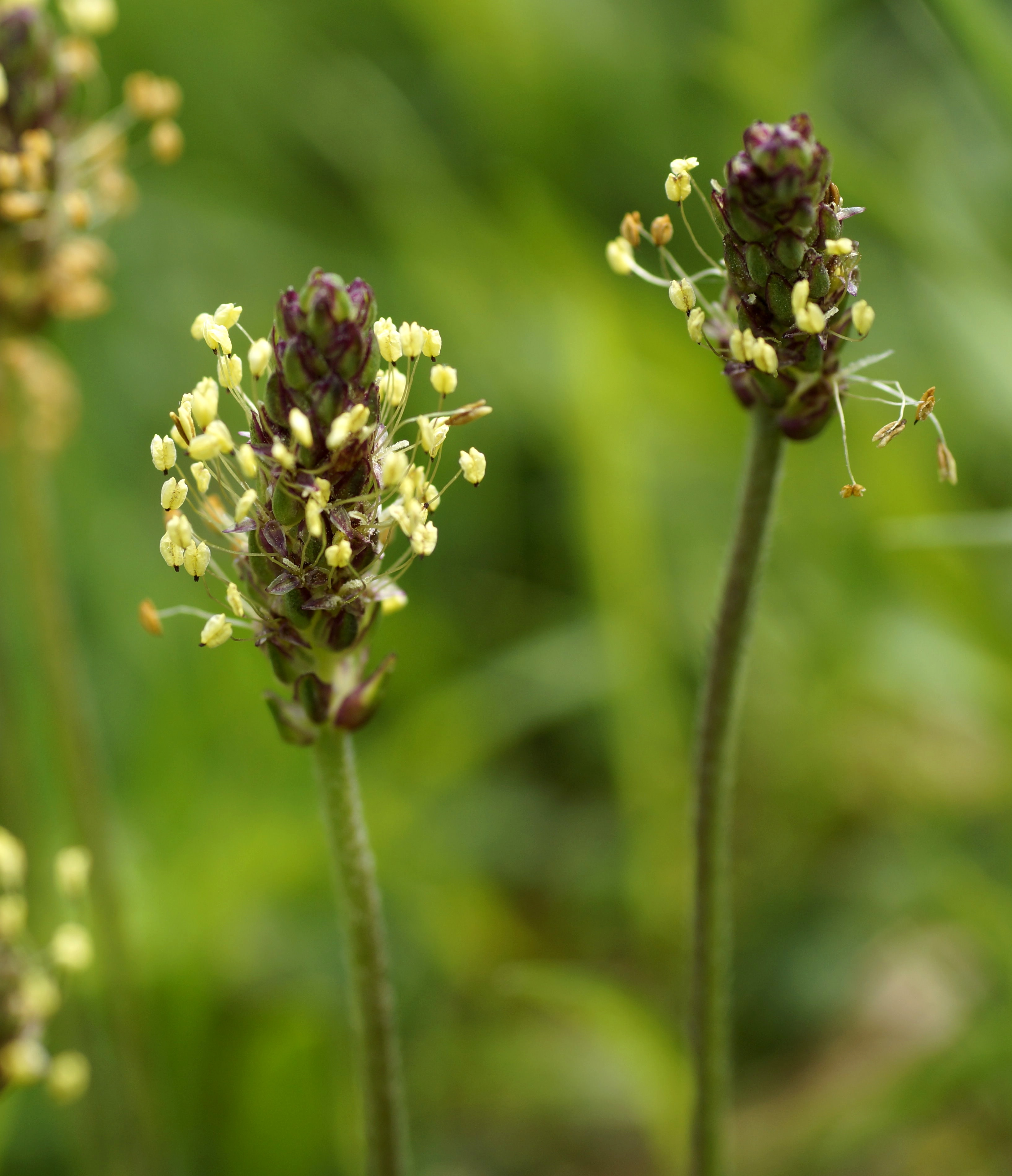 Alpen-Wegerich, Plantaginaceae Oesterreich, Kleinwalsertal, Riezlern, Kanzelwand, 1800 m Photo: U.Schmidt, 12.VII.2013